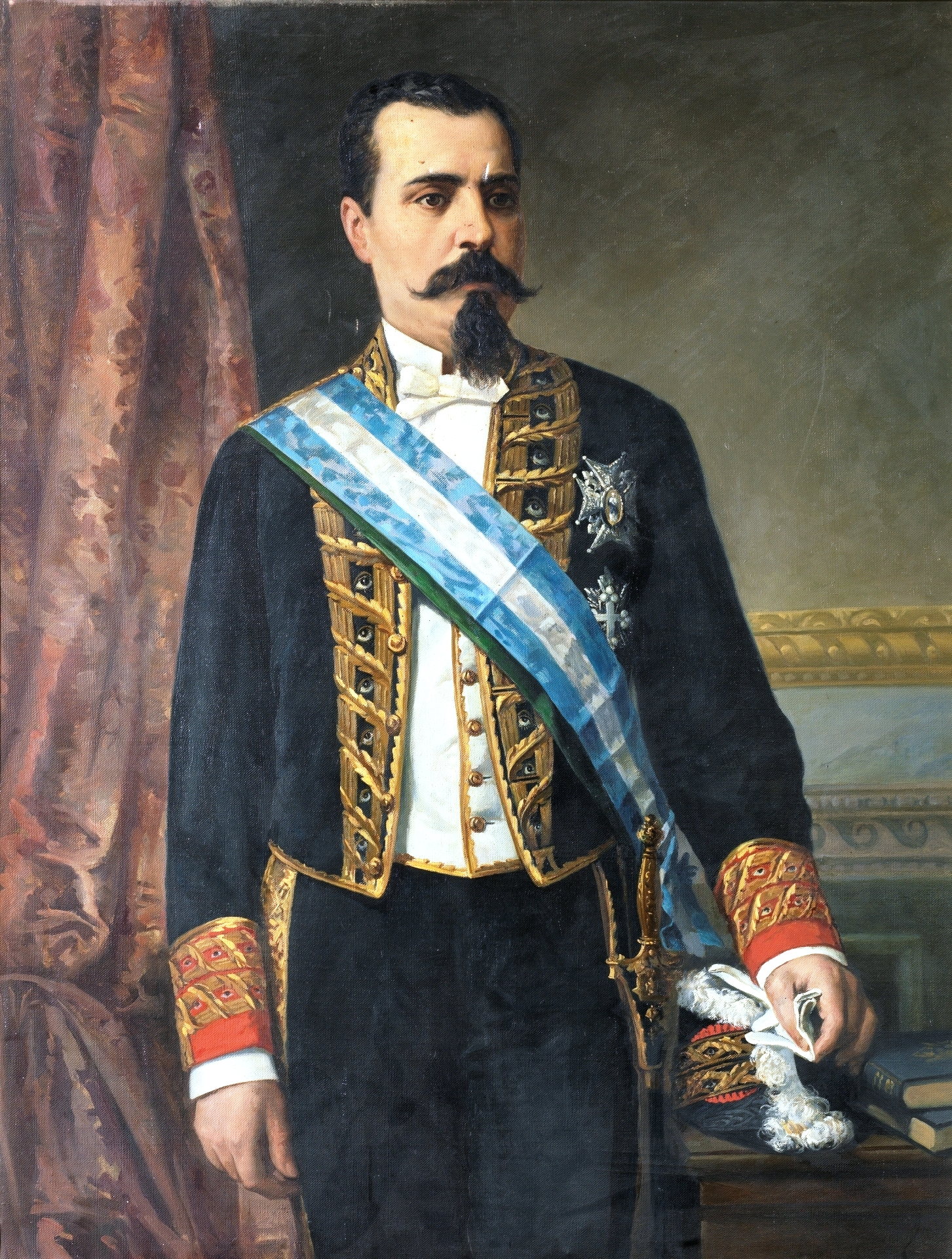 Retrato del abogado y político español Cristóbal Martín de Herrera (1831-1878), que llegó a ser ministro en varias ocasiones en diferentes gobiernos.